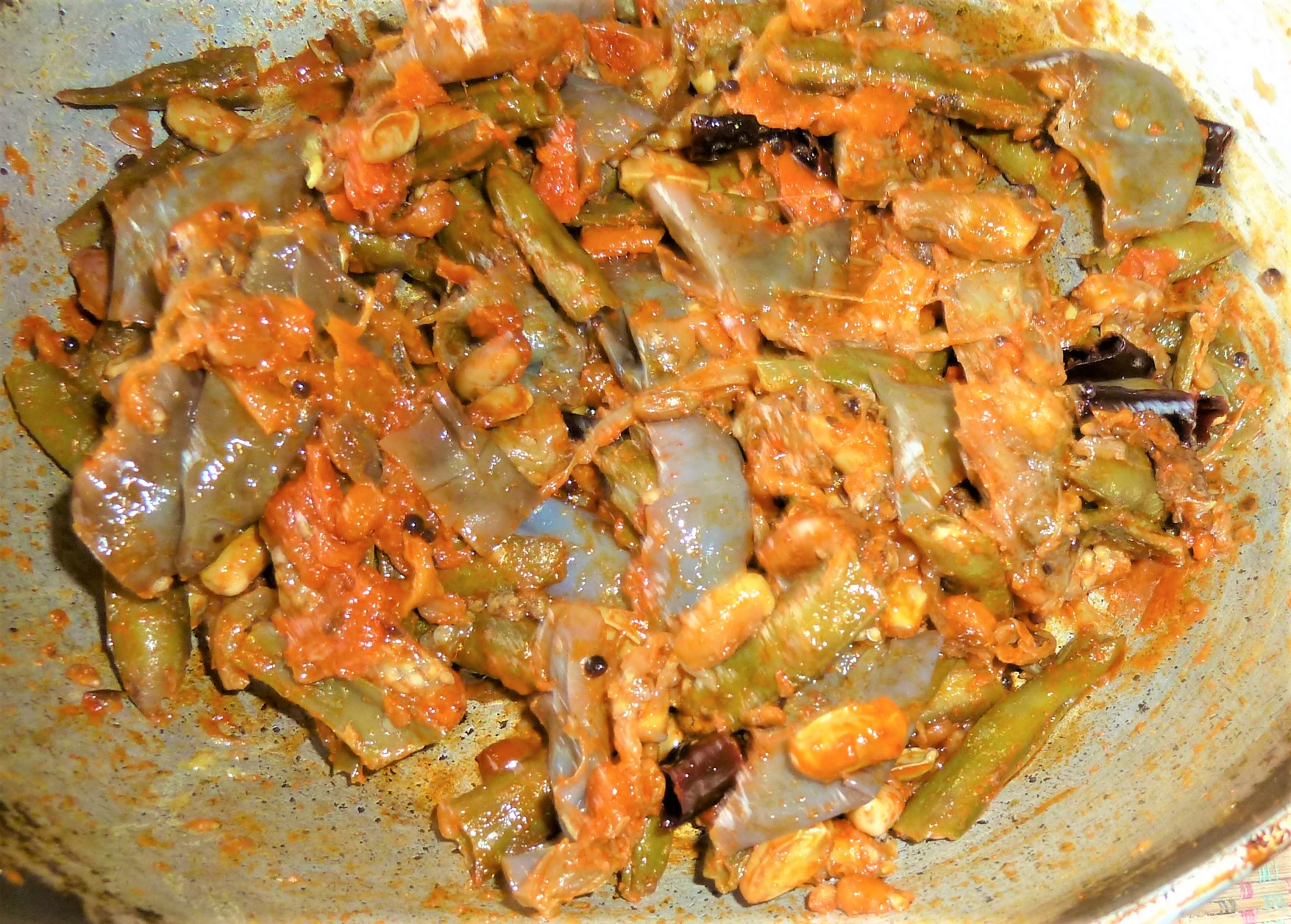 వంకాయ టమాట చిక్కుడుకాయ పోపు కూర